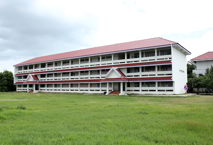 อาคารสุริยมณฑล หอพักบ้านสมเด็จ อู่ทองทวาราวดี